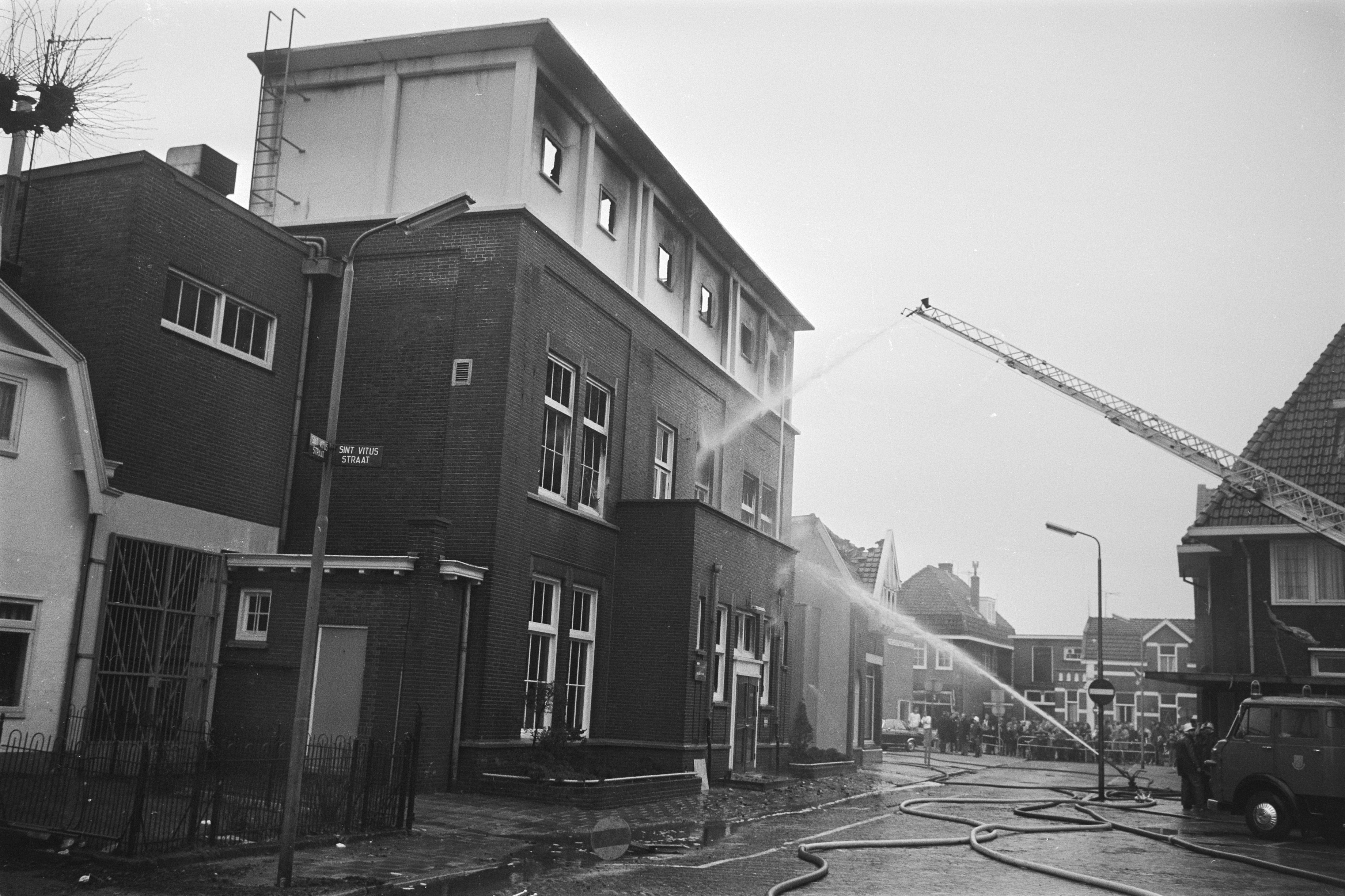 Collectie / Archief : Fotocollectie Anefo Reportage / Serie : Vitus Studio van de NOS te Bussum afgebrand Beschrijving : Voorgevel van de Vitus Studio staat op instorten Datum : 22 maart 1971 Locatie : Bussum, Noord-Holland Trefwoorden : branden, brandweer, televisiestudio's Instellingsnaam : NOS Fotograaf : Fotograaf Onbekend / Anefo Auteursrechthebbende : Nationaal Archief Materiaalsoort : Negatief (zwart/wit) Nummer archiefinventaris : bekijk toegang 2.24.01.05 Bestanddeelnummer : 924-3809